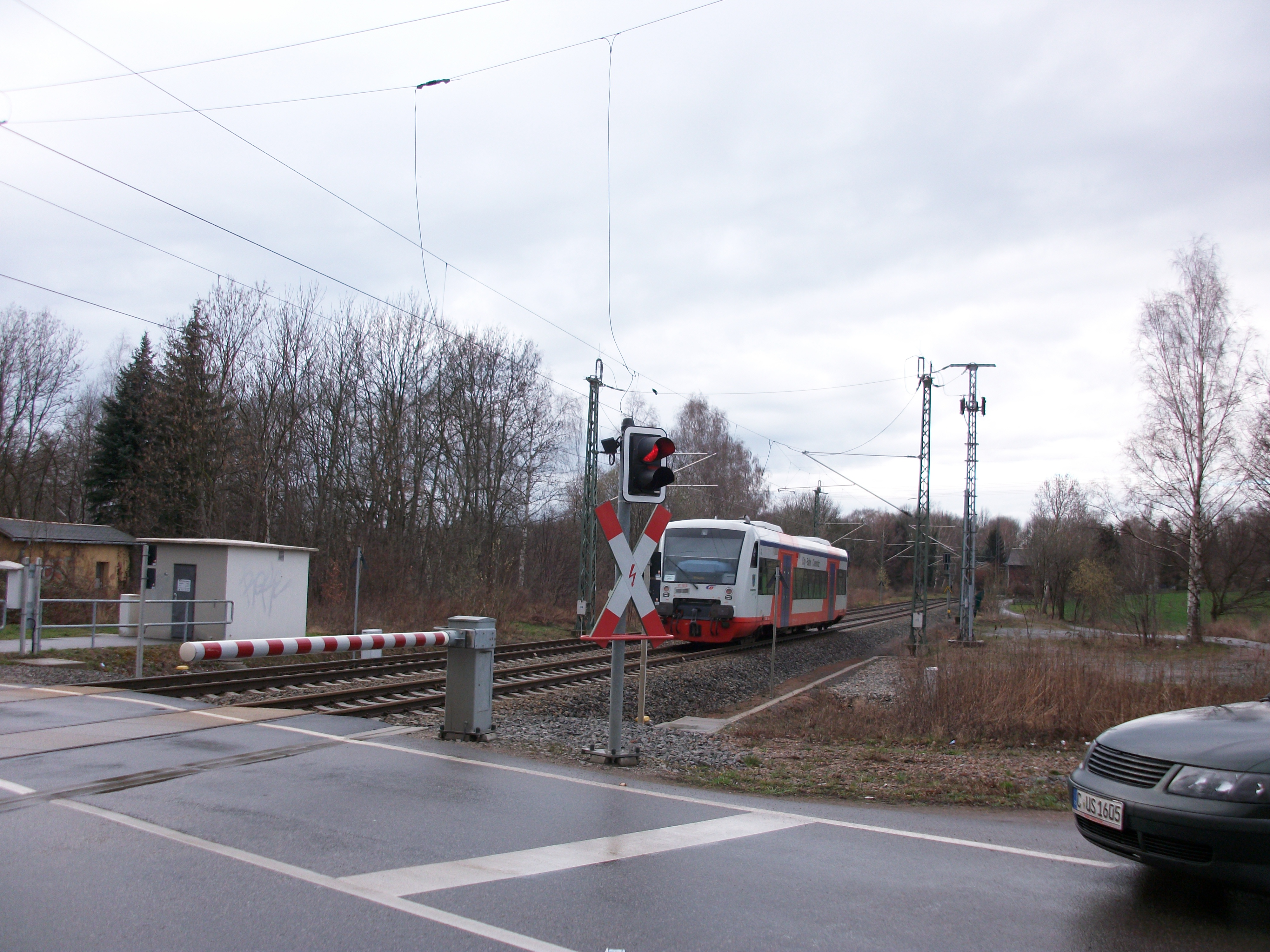 City-Bahn nach Mittweida (2016)